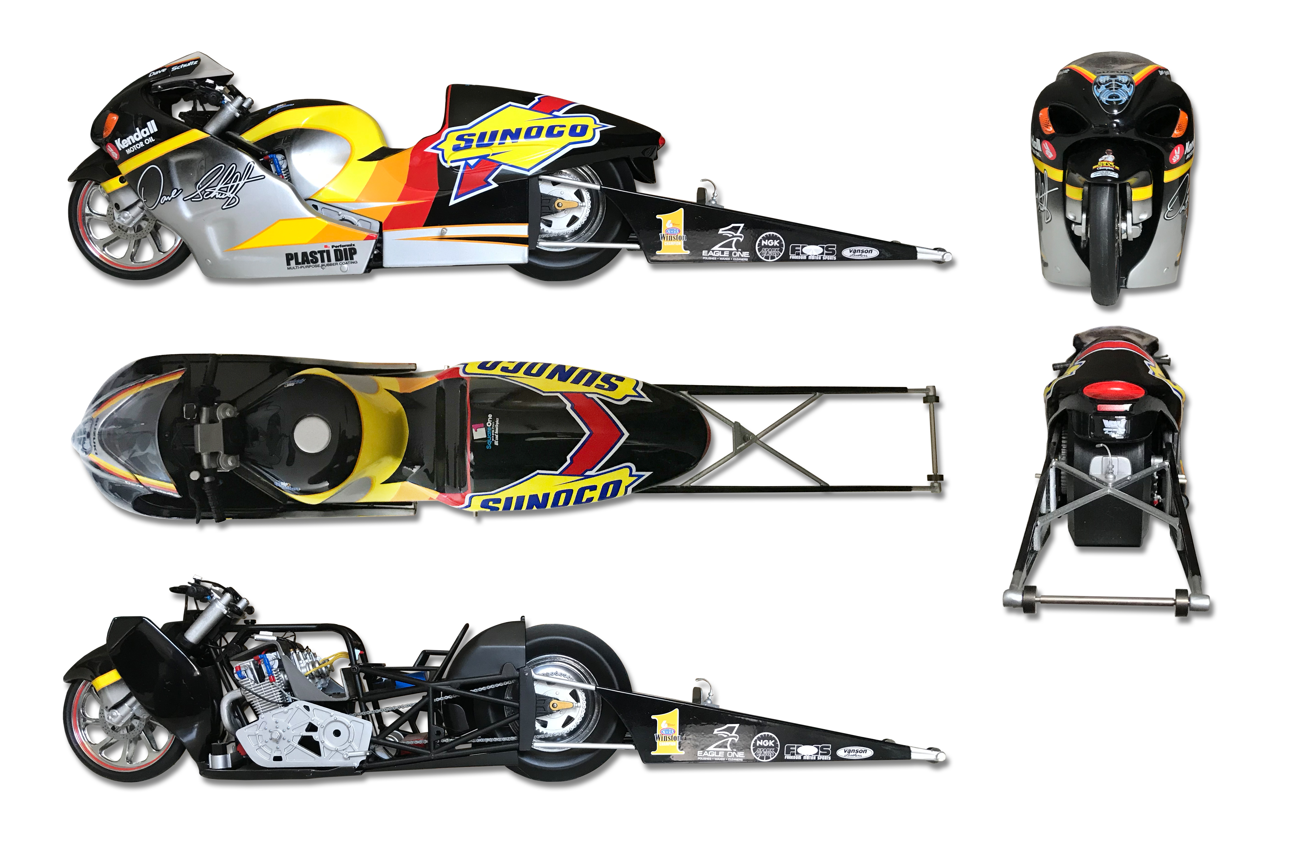 Pro Stock Bike (Drag Racing)